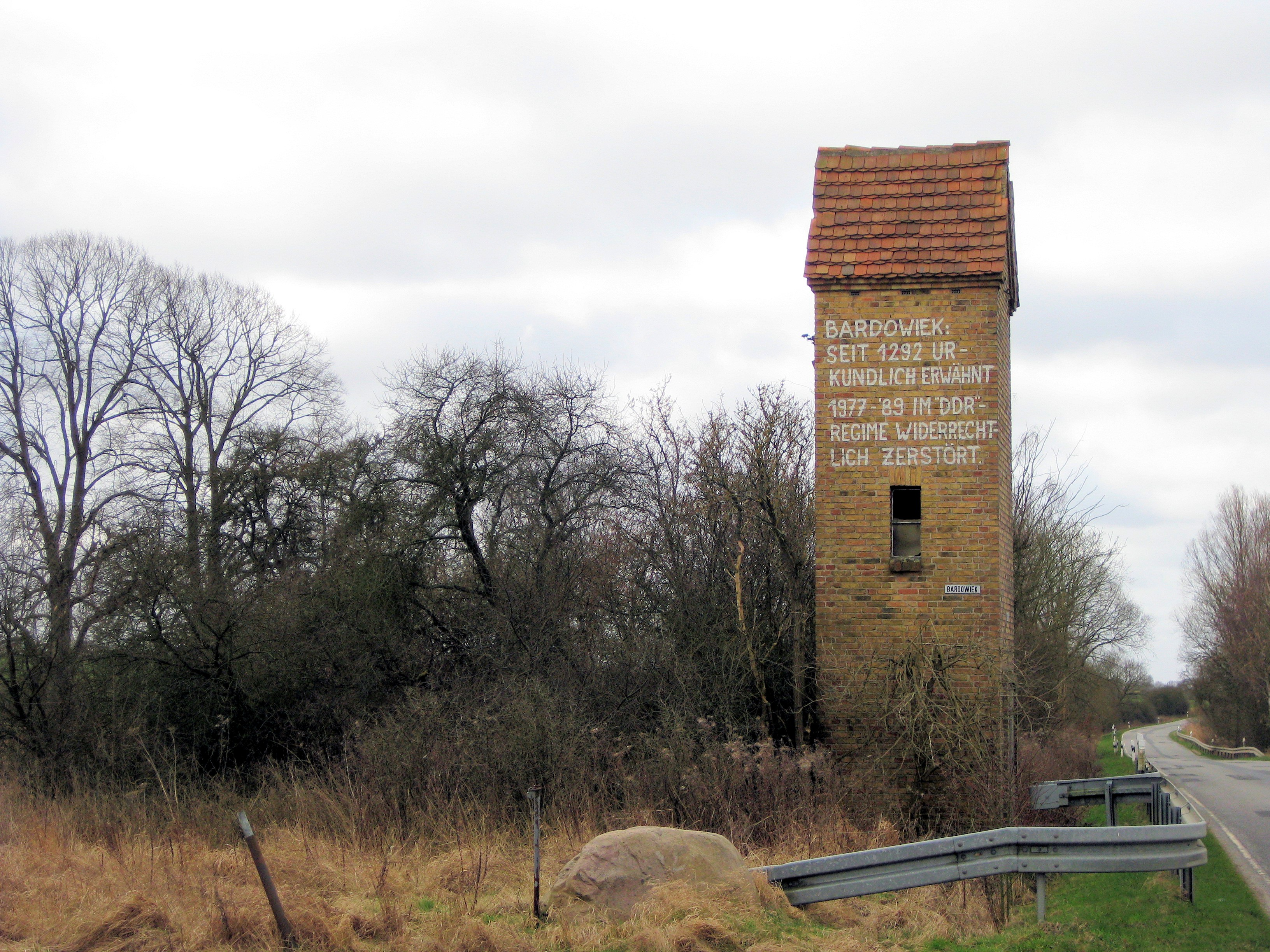 Ehem. Stromhäuschen in der Wüstung Bardowiek in der Gemeinde Selmsdorf